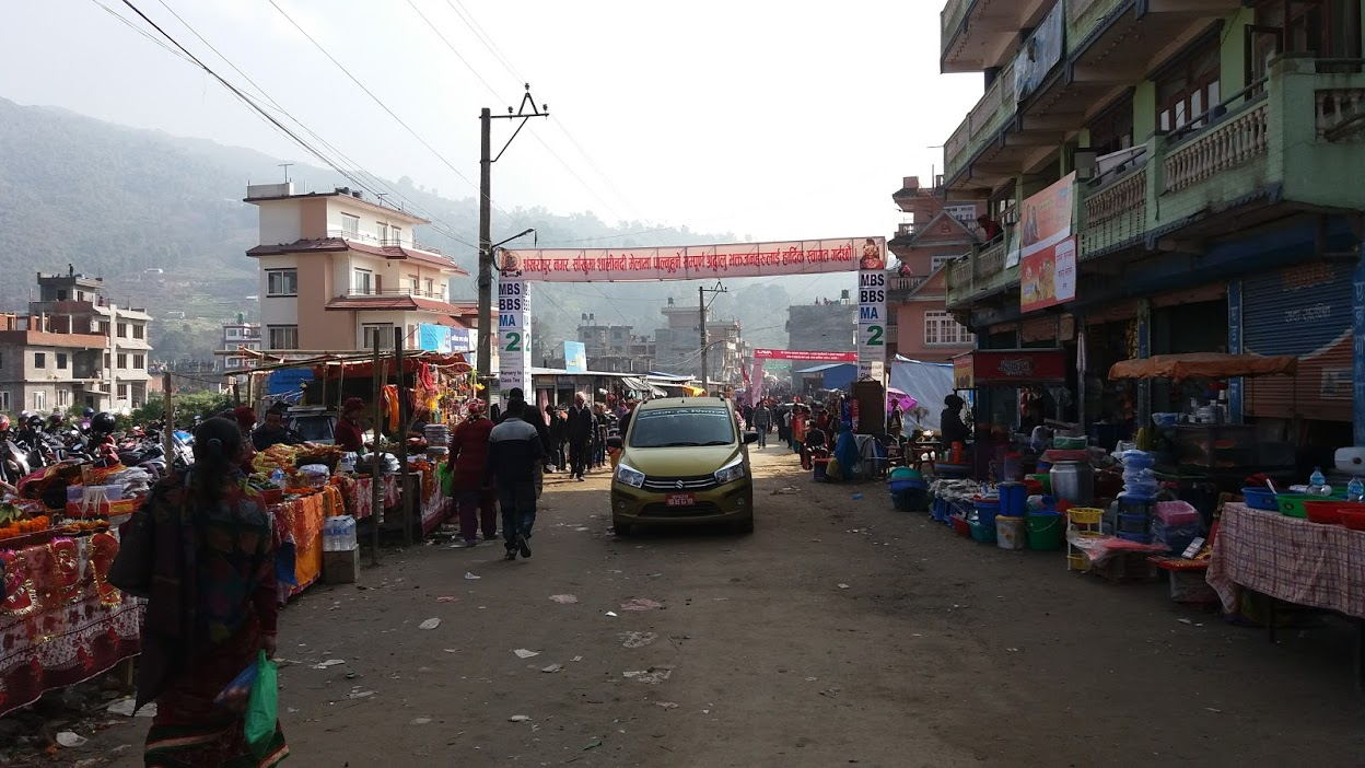 नेपाली: शाली नदीमा माघ महिनामा लागेको मेला